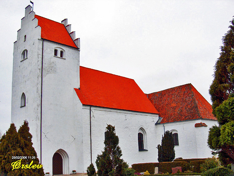 fra sydvest